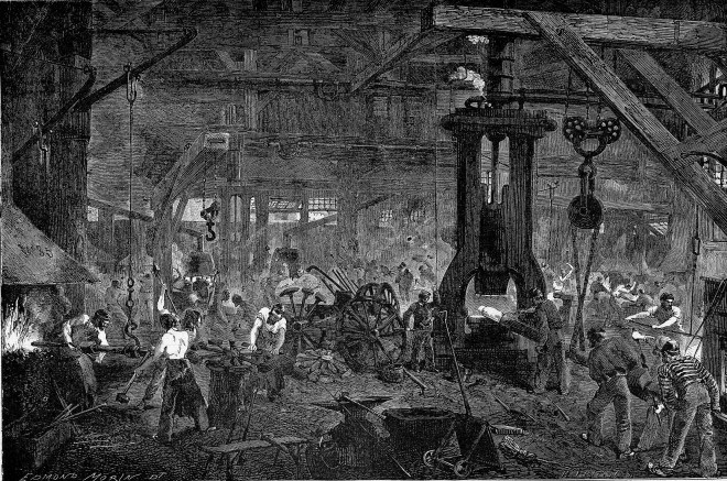 DerosneCail-Grenelle-660x437